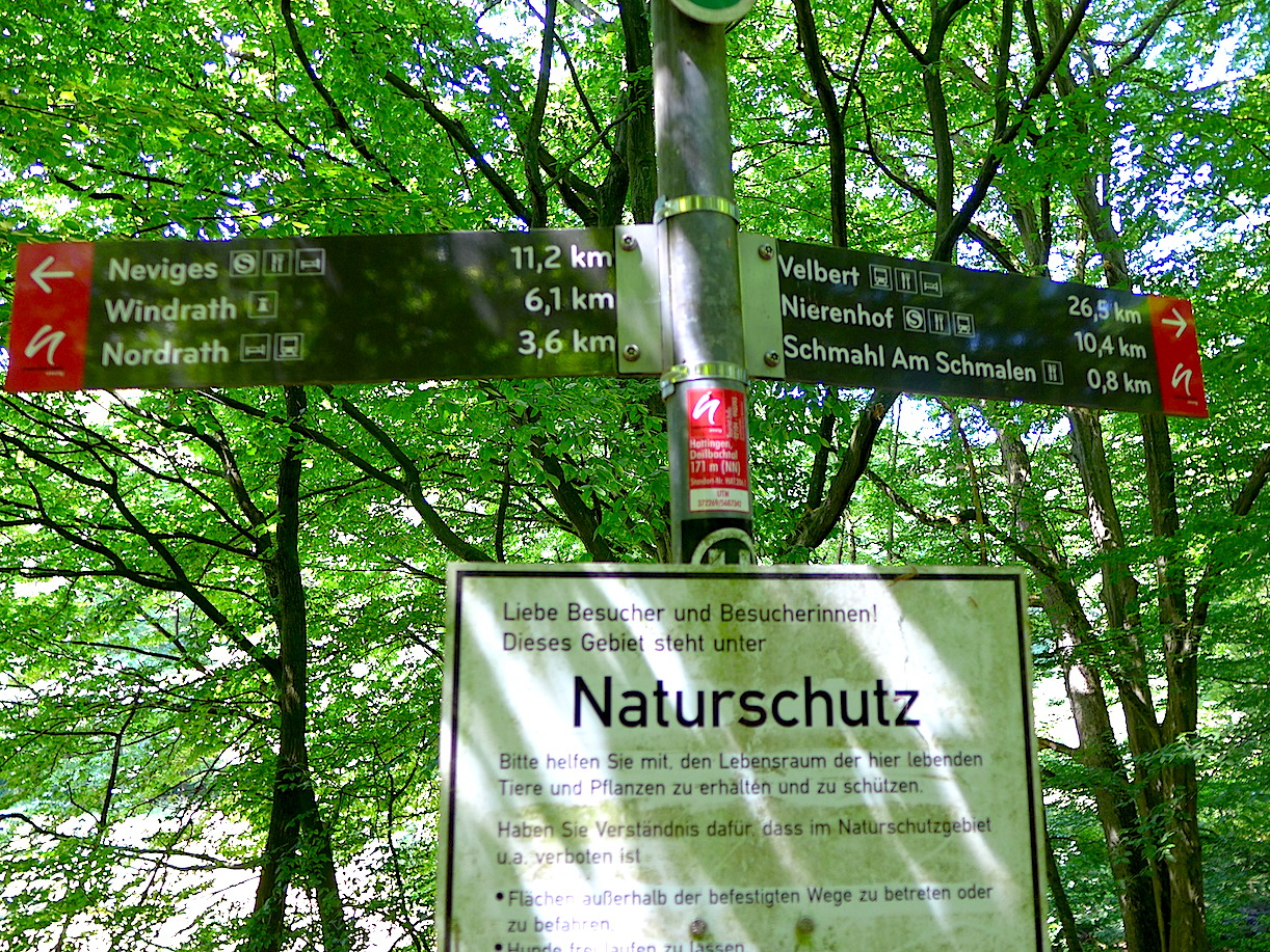 Этап "Нордрат-Ниренхоф" маркированного турмаршрута "Тропа Неандерланд", Северный Рейн-Вестфалия, Германия.